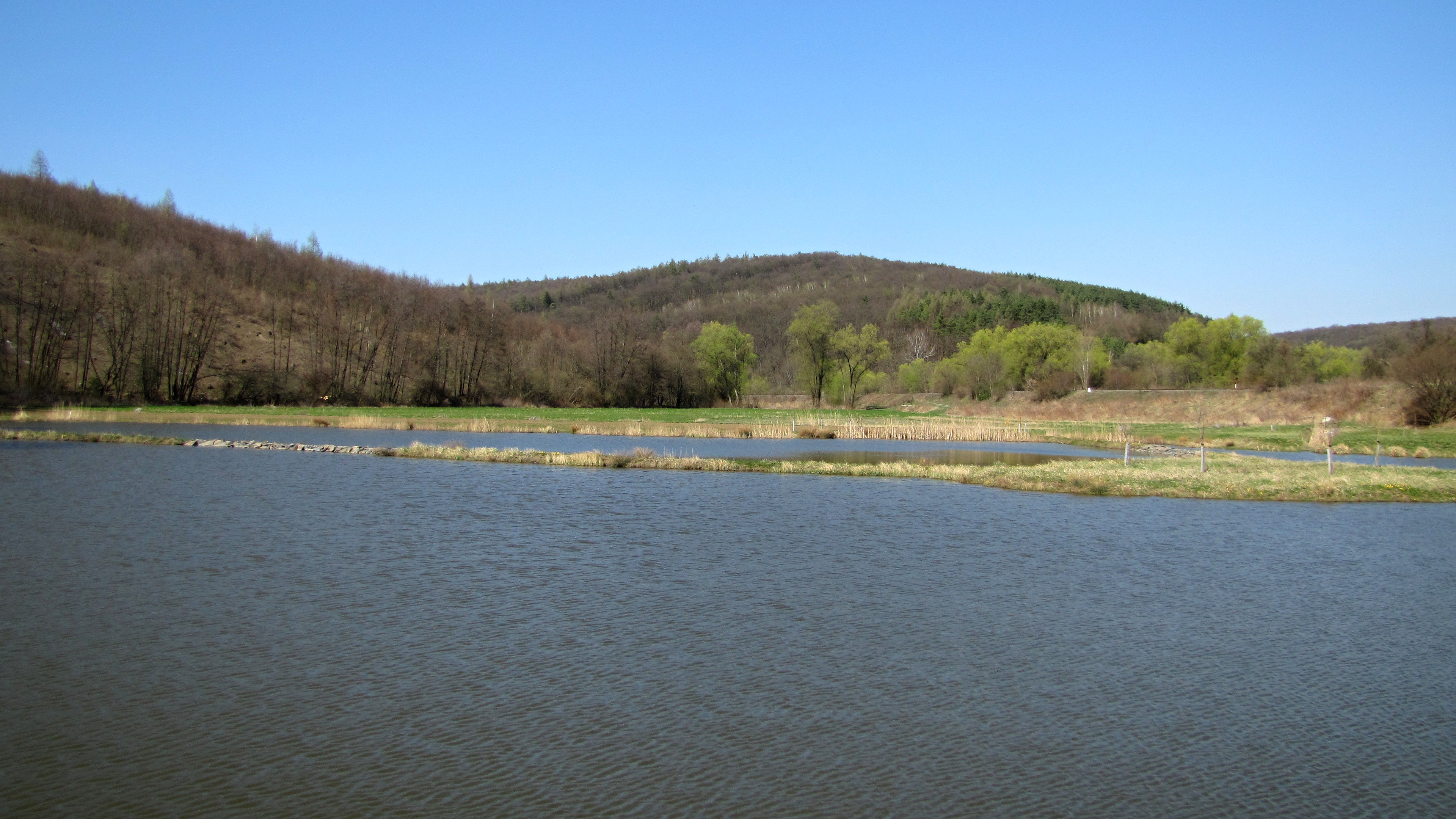 Rybník na Kyjovce v Bohuslavicích u Kyjova